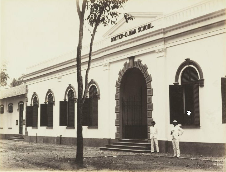 Title: Ingang met opschrift Dokter-Djawa School van de School tot Opleiding van Inlandse Artsen (STOVIA) aan de Hospitaalweg te Batavia Image code: 35810 Description: Ingang met opschrift Dokter-Djawa School van de School tot Opleiding van Inlandse Artsen (STOVIA) aan de Hospitaalweg te Batavia Keywords: buildings, Jakarta Raya, medical education, STOVIA, Indonesia Albumnumbe: r302 Album title: Ter herinnering aan de inhuldiging van koningin Wilhelmina en tot heil der bevolking van Nederlandsch Oostindië Artist: Tan Tjie Lan / Batavia Date: Circa 1902 Object type: Foto Technique: Albuminedruk Additional: Ontwikkeling van het geneeskundig onderwijs te Weltevreden 1851-1926.- Weltevreden: S.T.O.V.I.A., 1926 Provenance: Antiquariaat Minerva / Den Haag Provenance type: Aankoop Acquisition date: 1992-12-08 Size: 19x25cm